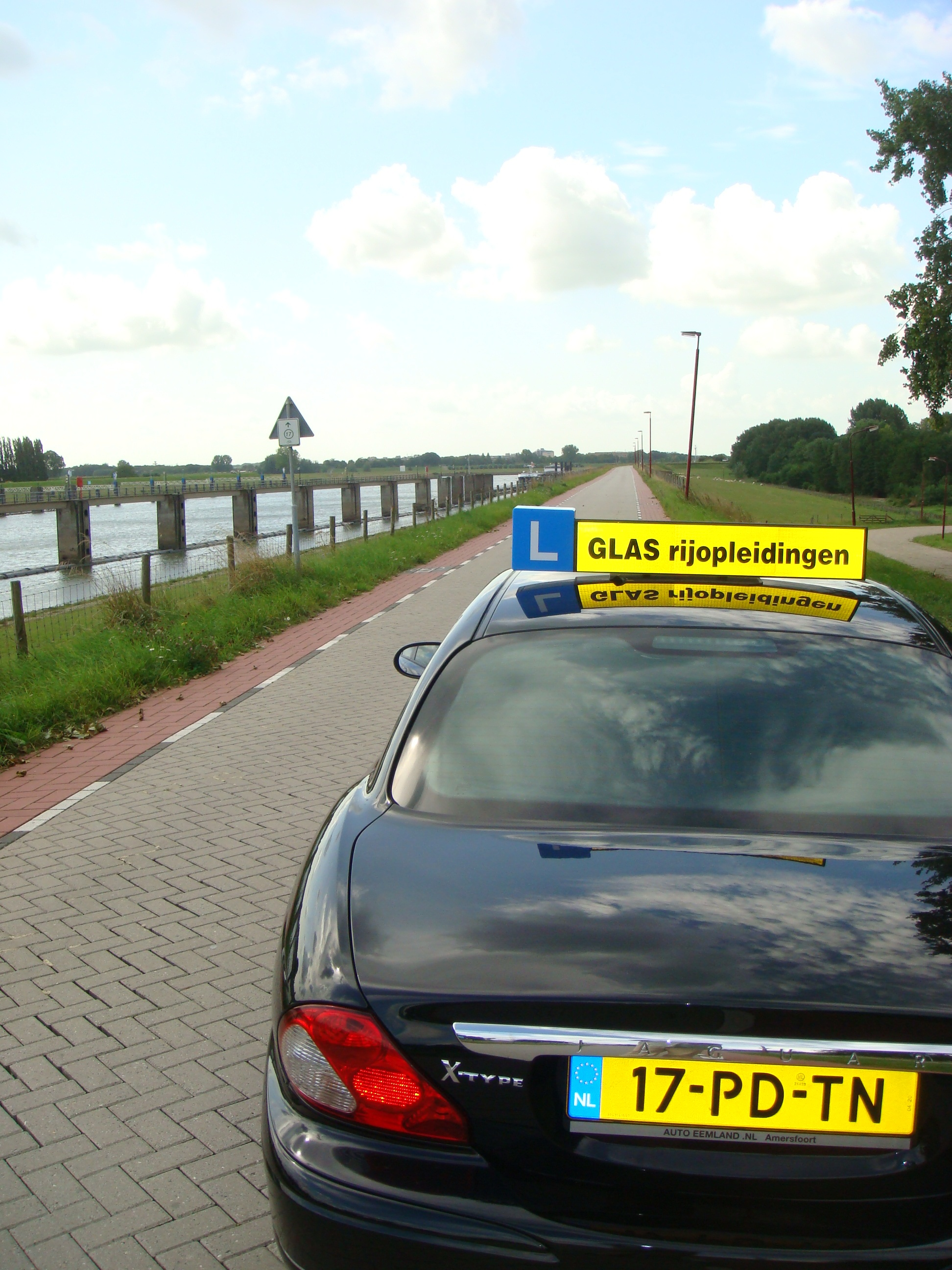 De lesauto waarmee vanaf 01 april 2010 gestart is.